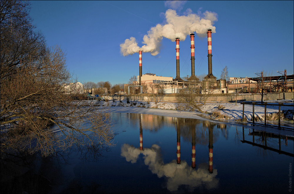 Мінская ЦЭЦ-2